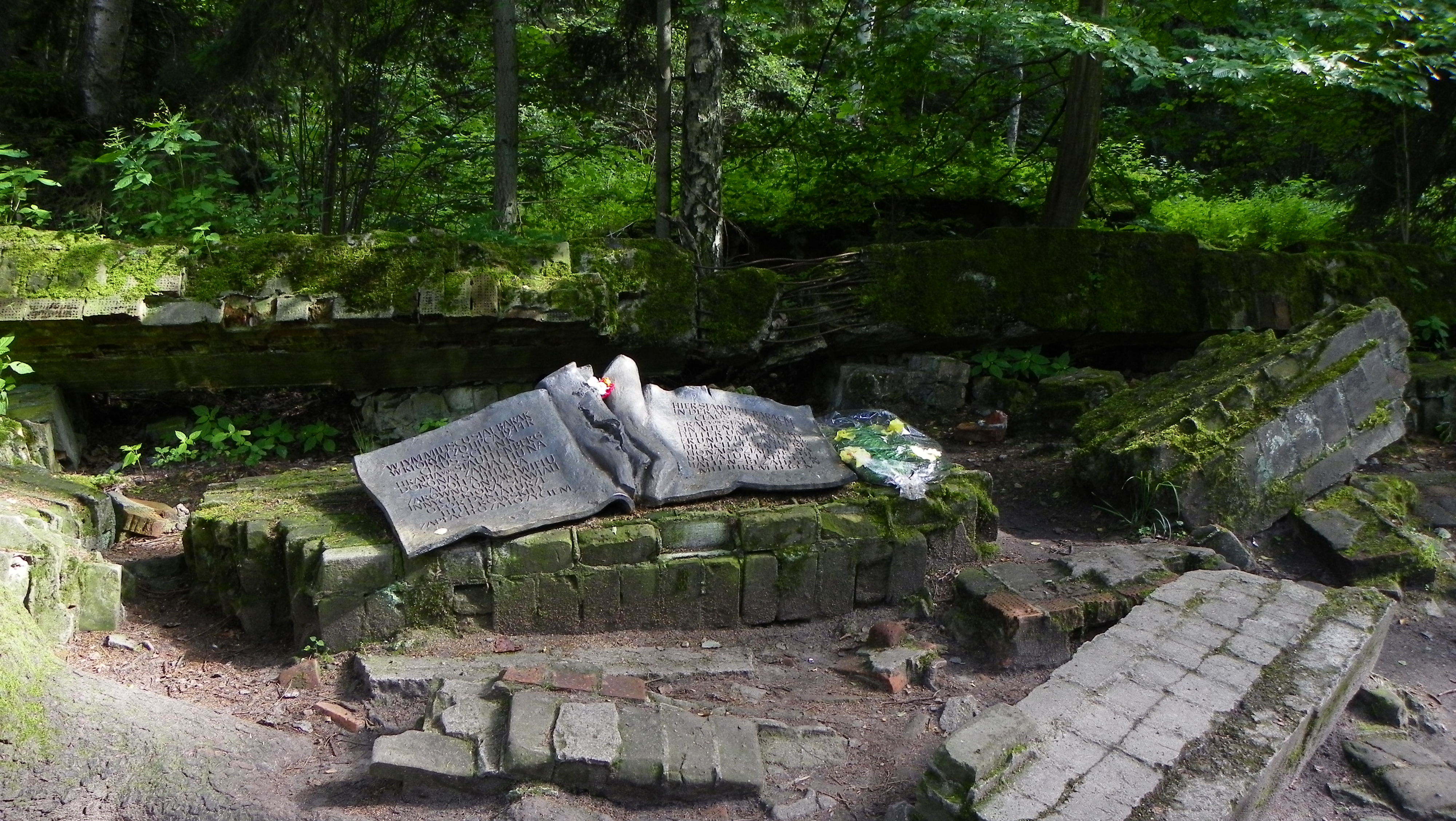 Wilczy Szaniec (niem. Wolfsschanze) – w latach 1941-1944 kwatera główna Hitlera i Naczelnego Dowództwa Sił Zbrojnych w lesie gierłoskim, na wschód od leżącej na skraju lasu wsi Gierłoż.